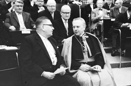 Freiburg: Auditorium Maximum, Finanzminister Dr. Hermann Müller und Erzbischof Schäufele, sitzend